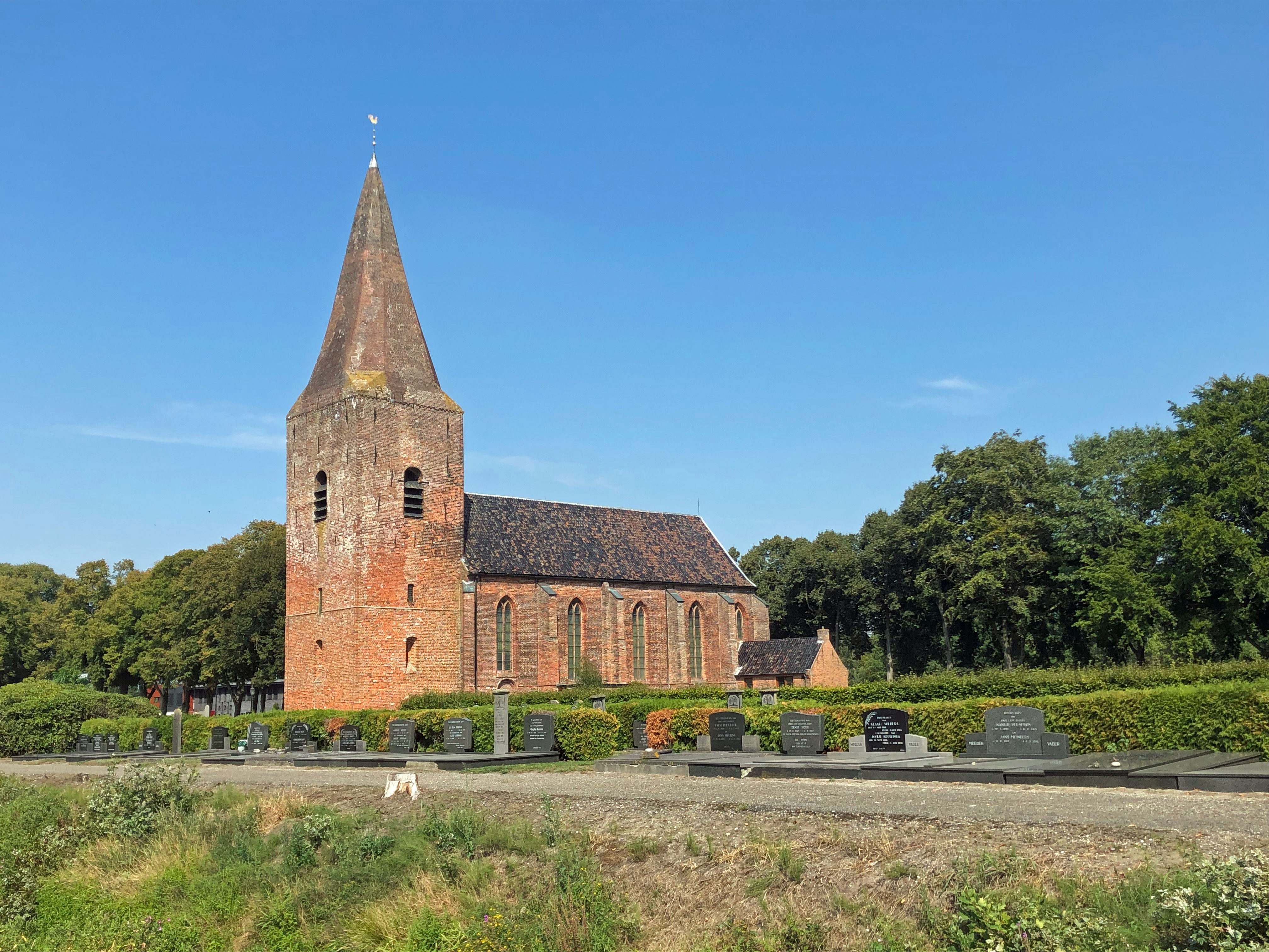 Nicolaaskerk van Onstwedde (zuidwestzijde)